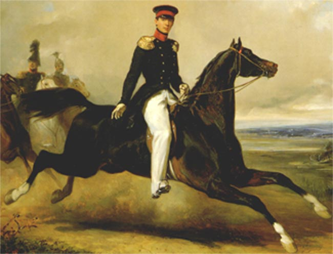 Willem Alexander Frederik Constantijn Nicolaas Michiel van Oranje-Nassau